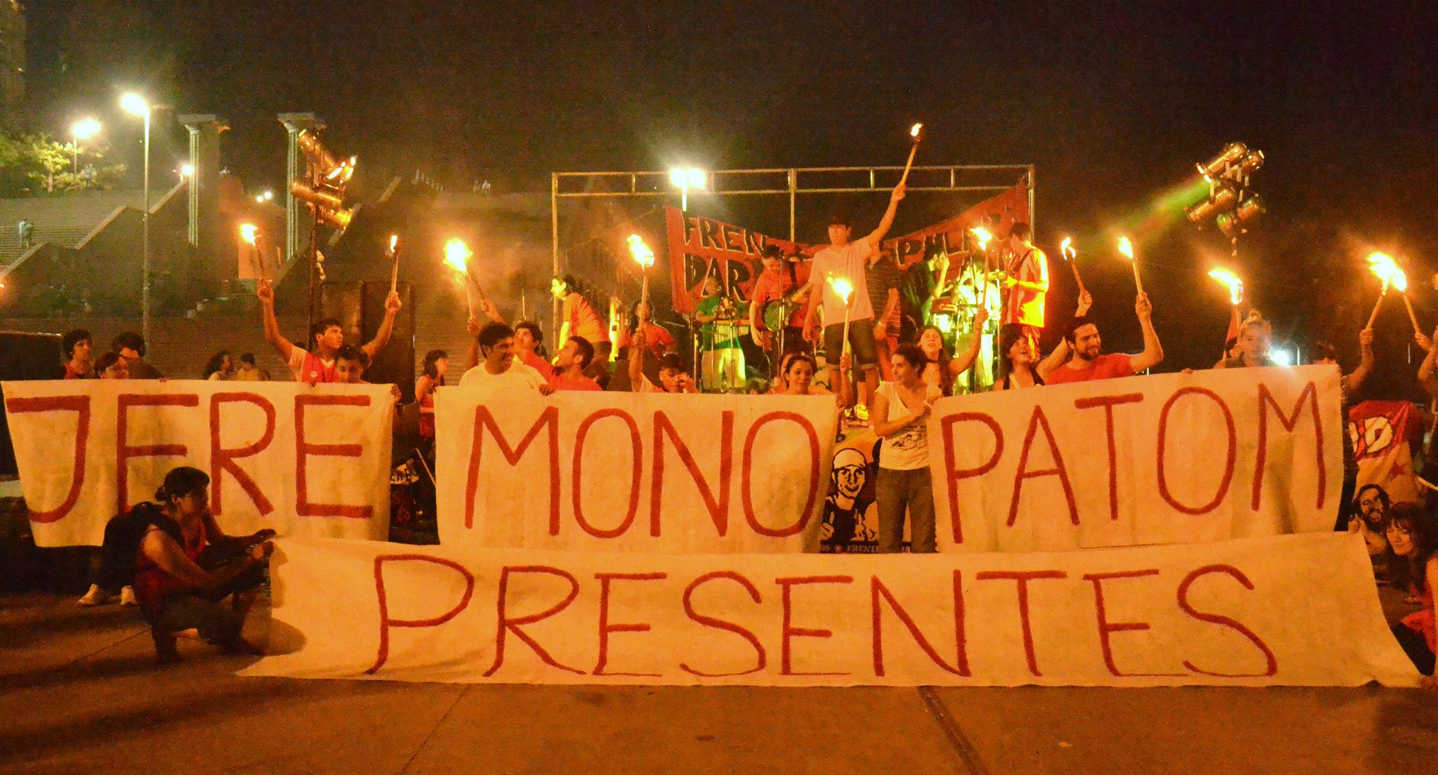 Jeremías Trasante, Mono Suárez y Patom Rodríguez fueron asesinados por grupos narcos, en complicidad con las fuerzas represivas, en Rosario en enero del 2012. Los tres eran jóvenes militantes populares del FPDS. El 4 de cada mes se los rememora y fortalece el pedido de justicia.